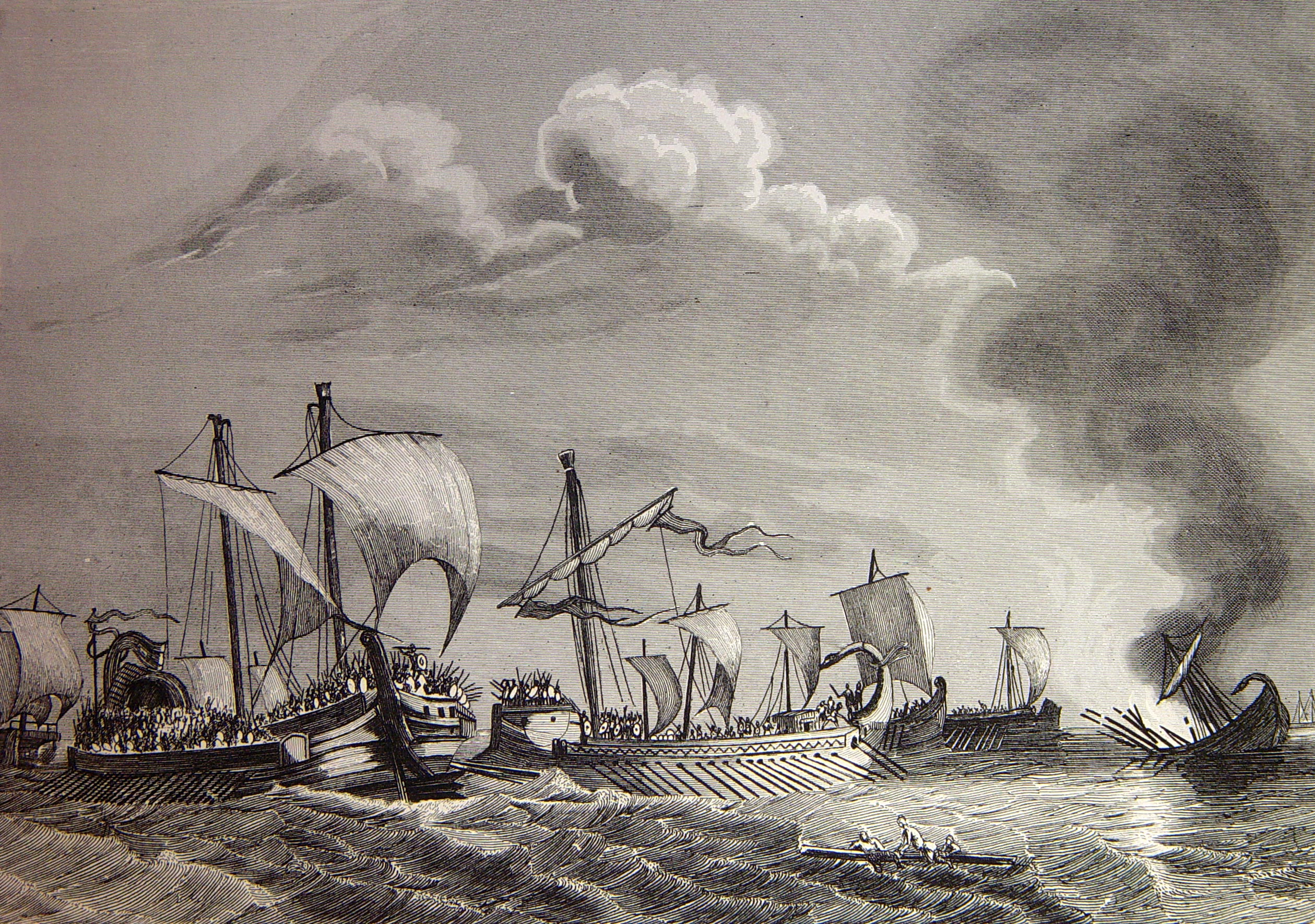 Ilustraciones pertenecientes al libro: Las glorias nacionales : grande historia universal de todos los reinos, provincias, islas y colonias de la Monarquía Española, desde los tiempos primitivos hasta el año de 1852. - Madrid [etc.] (Barcelona : Imprenta de Luis Tasso) Librería de la Publicidad [etc.], 1852-1854.